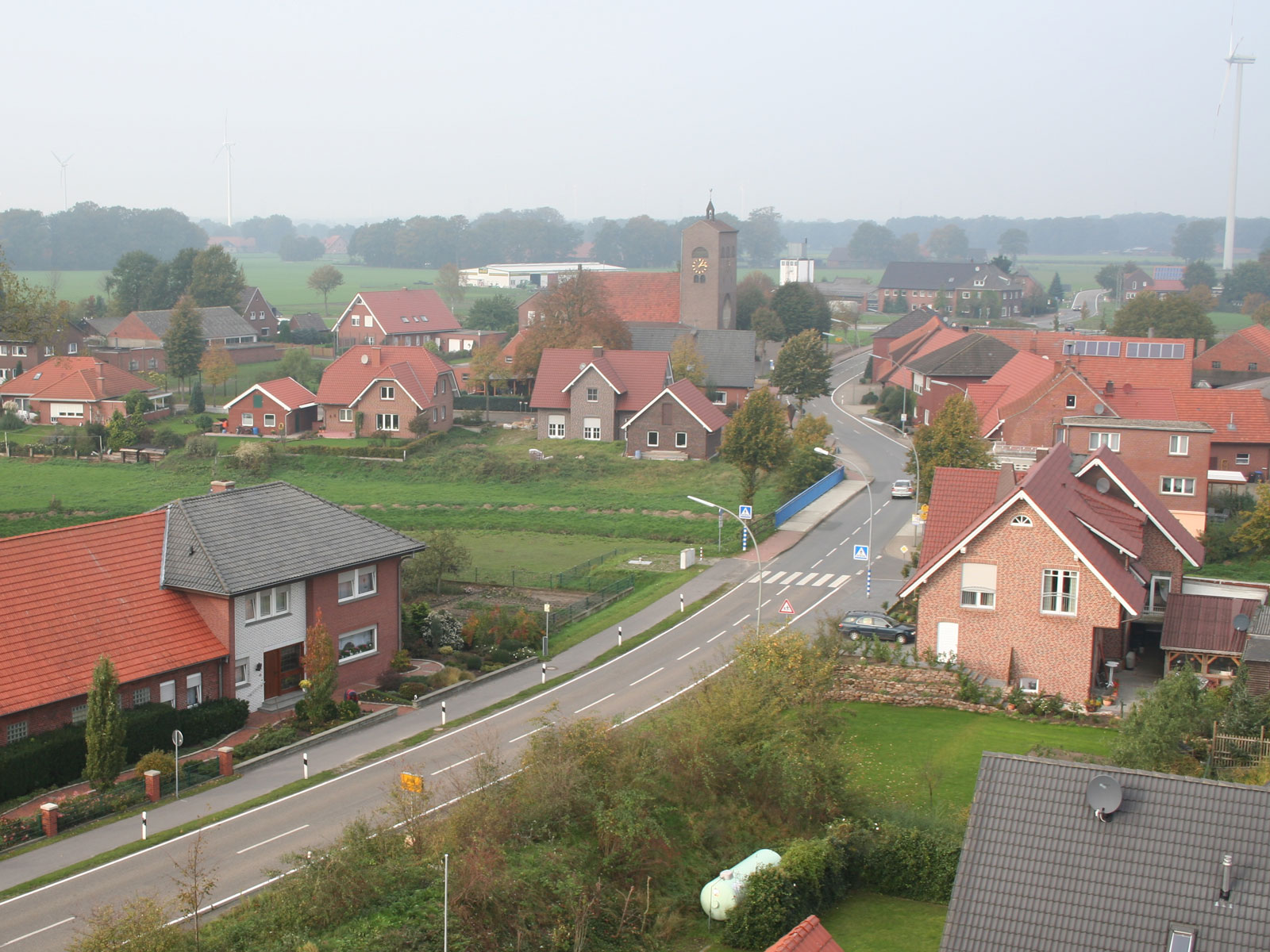 Foto zeigt das Dorf Bilk (Ortsteil von Wettringen)